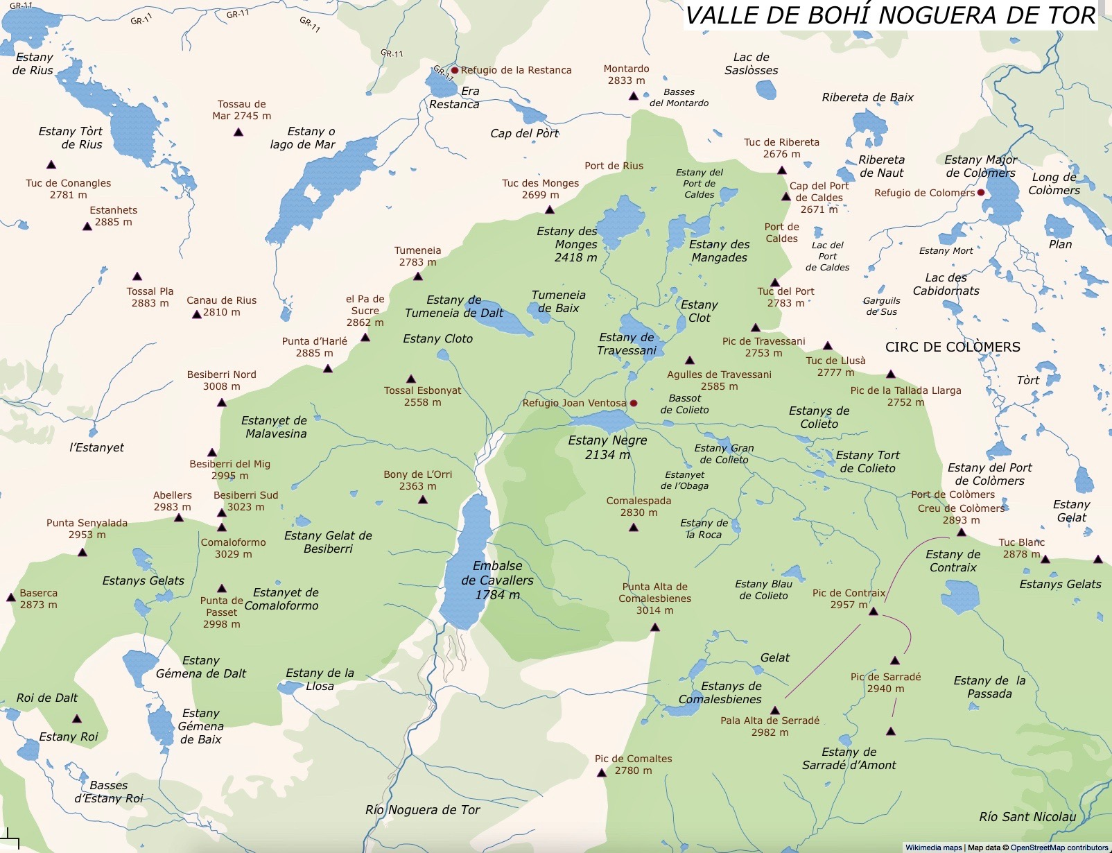 Lagos y cimas del valle alto del Noguera de Tor, por encima del embalse de Cavallers